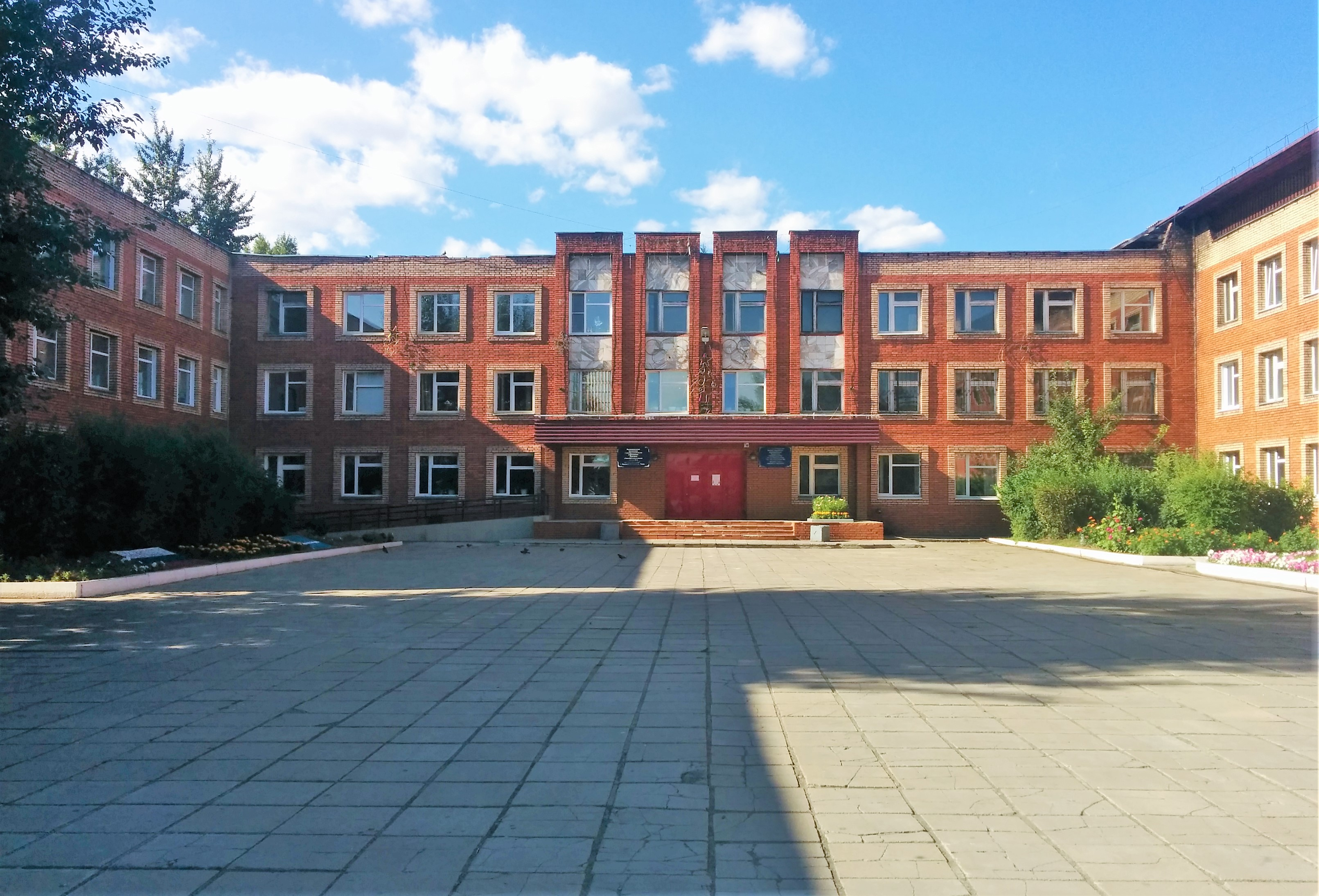 Тыва дыл: Кызылдың бирги школазы